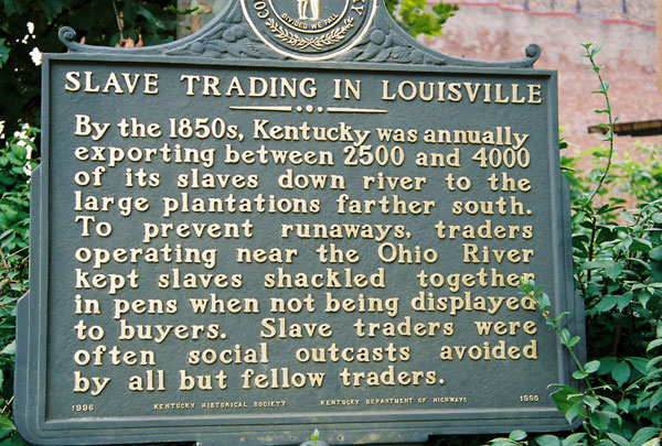 Slave Marker in Louisville